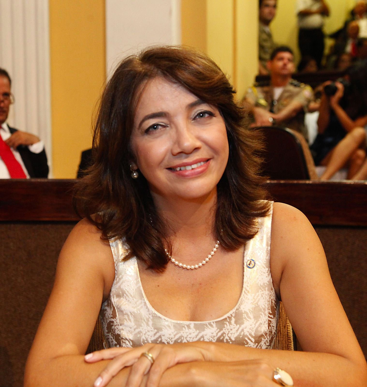 Mary Gouveia